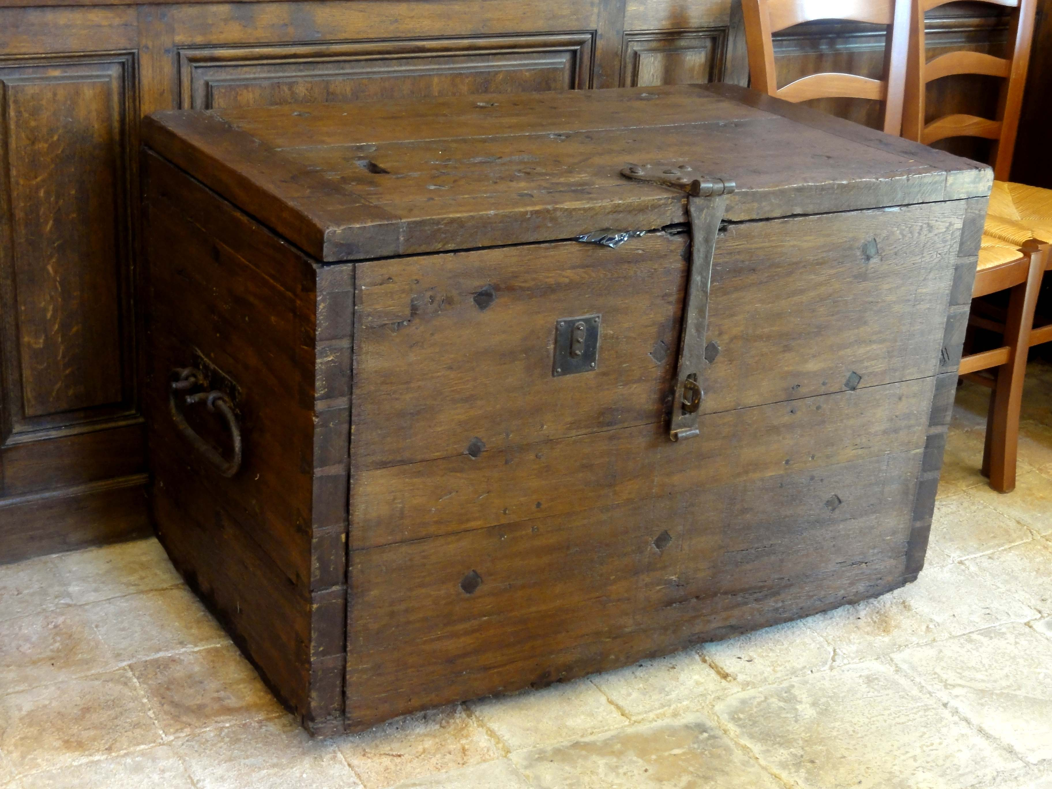 Mobilier de l'église (voir titre).